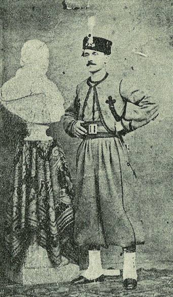 Canadien C.-E. Roulleau, régiment des Zouaves Pontificaux, à Rome en mai 1868 Zouave Pontificaux C.-E. Roulleau porte le petit bonnet de fourrure garni d’une aigrette blanche. Cette coiffure était portée en grande tenue. Pour la pluspart des occasions, les zouaves portaient le képi gris à bandeau rouge. De retour au Canada, Roulleau devint l’un des principaux organisateurs d’unités de zouaves au Canada français.